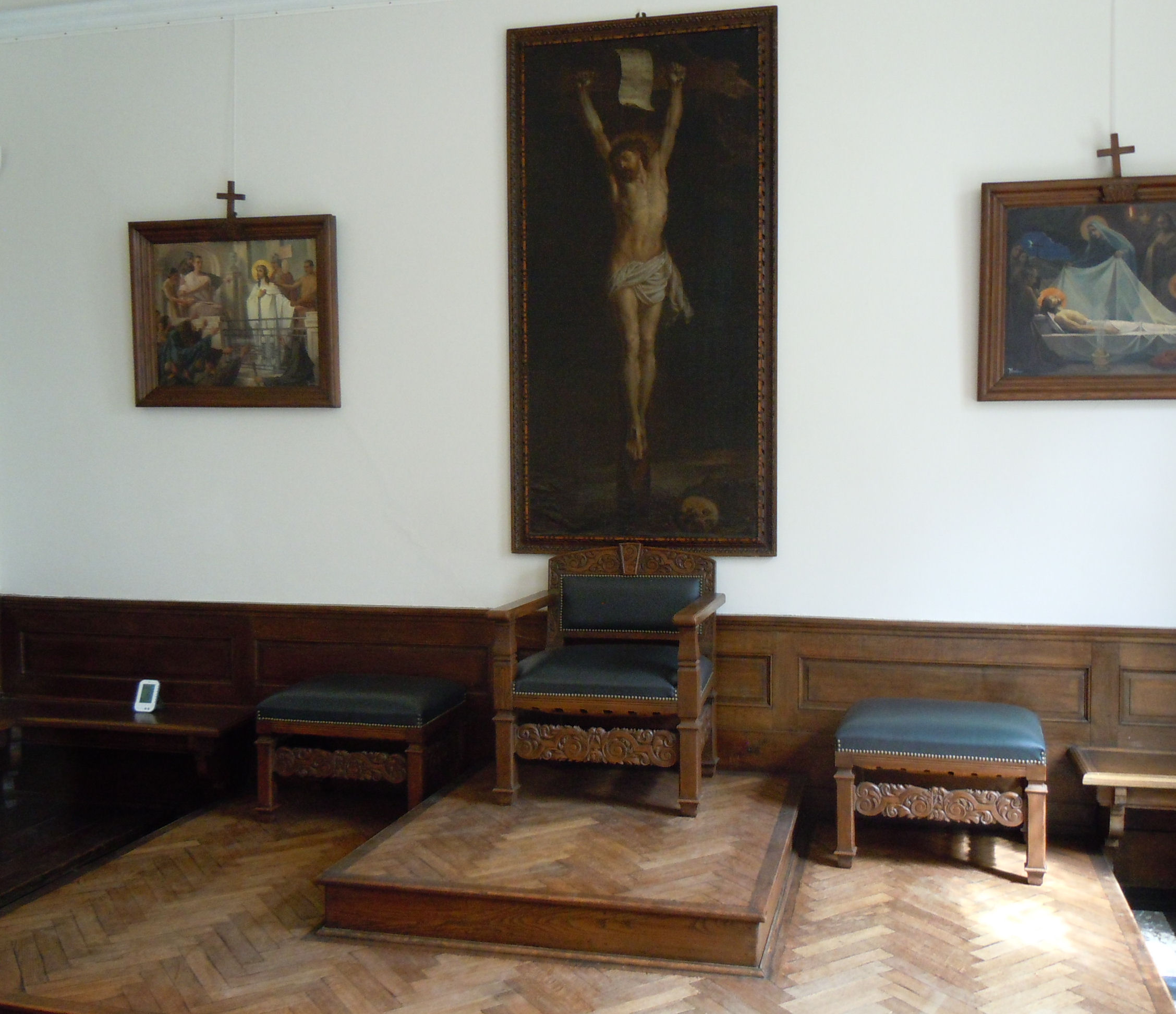 ABDIJ ST BERNARDVS